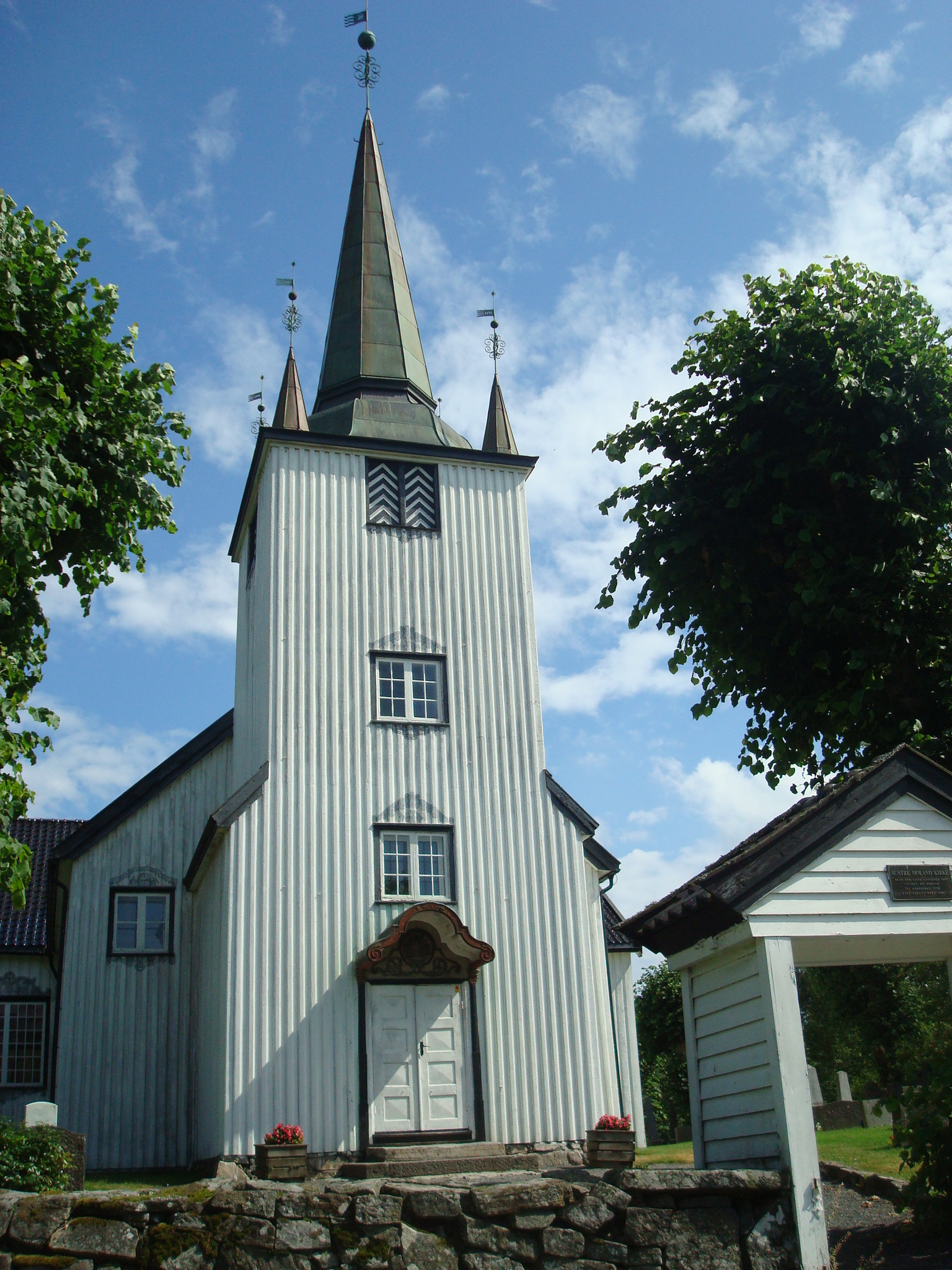 Austre Moland kirke